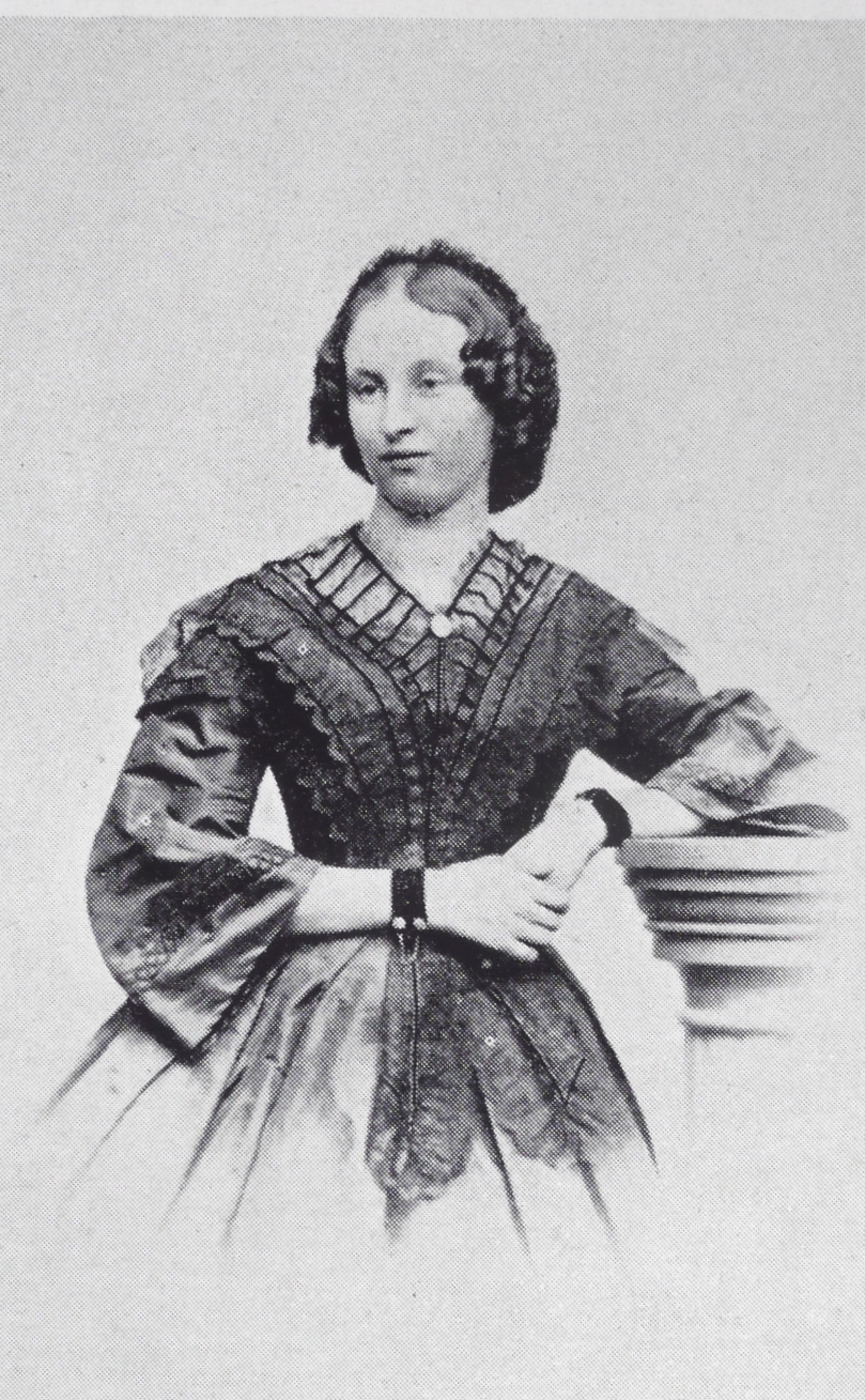 Johann Rudolf Rahn Caroline Rahn